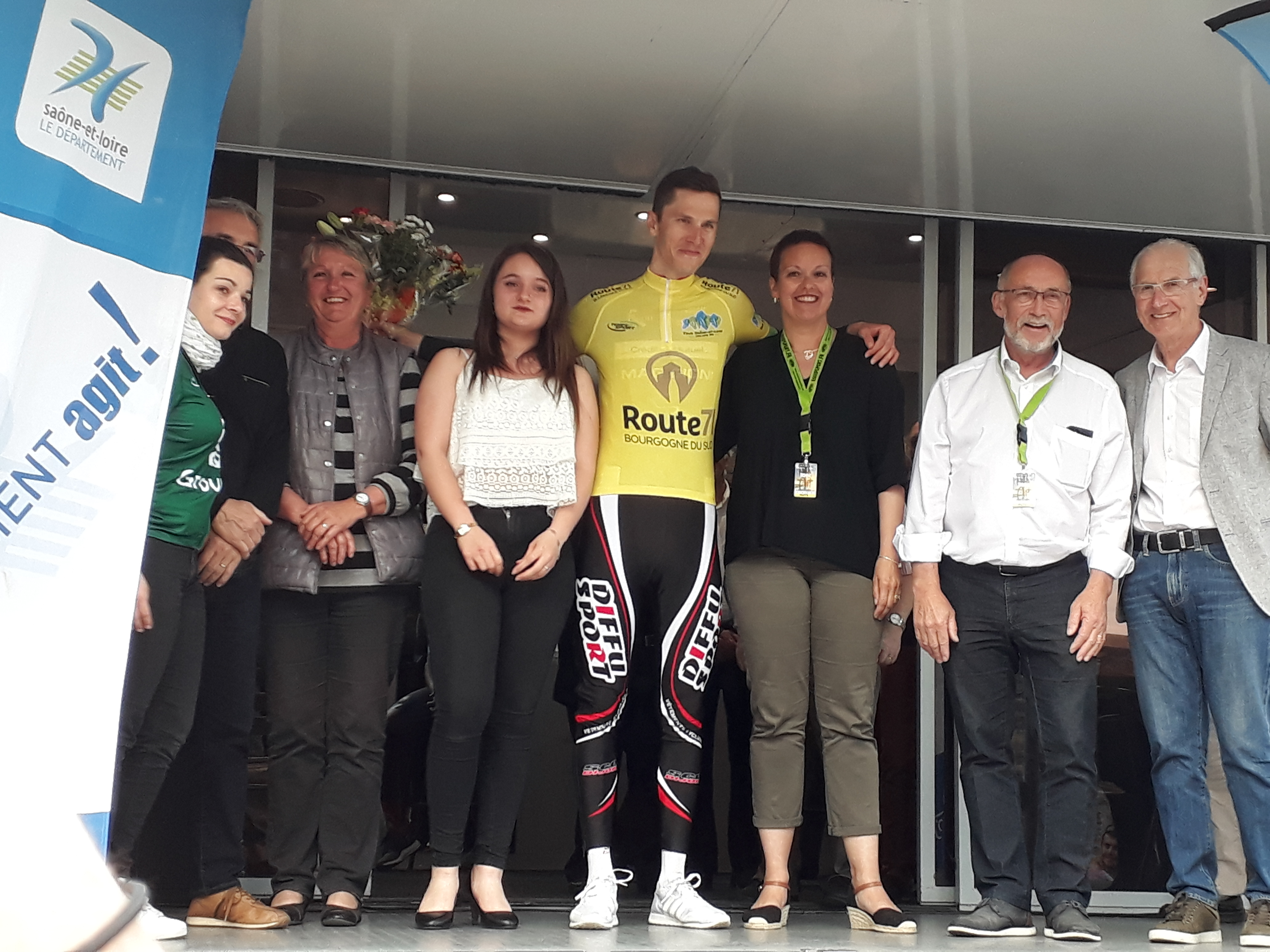 classement générale du tour de saone et Loire